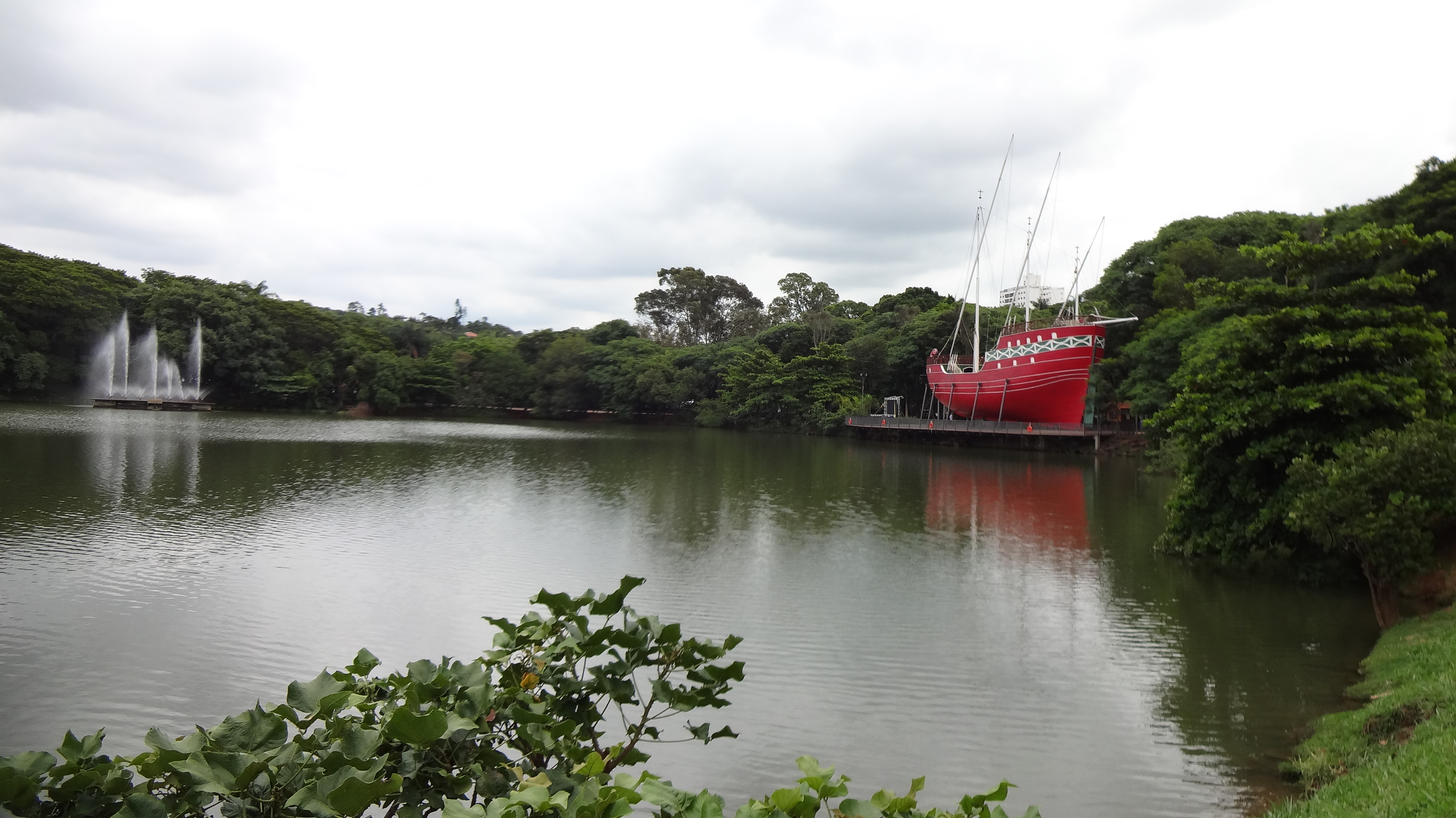 Lagoa Isaura Teles Alves de Lima, no Parque Portugal (Lagoa do Taquaral) em Campinas/SP